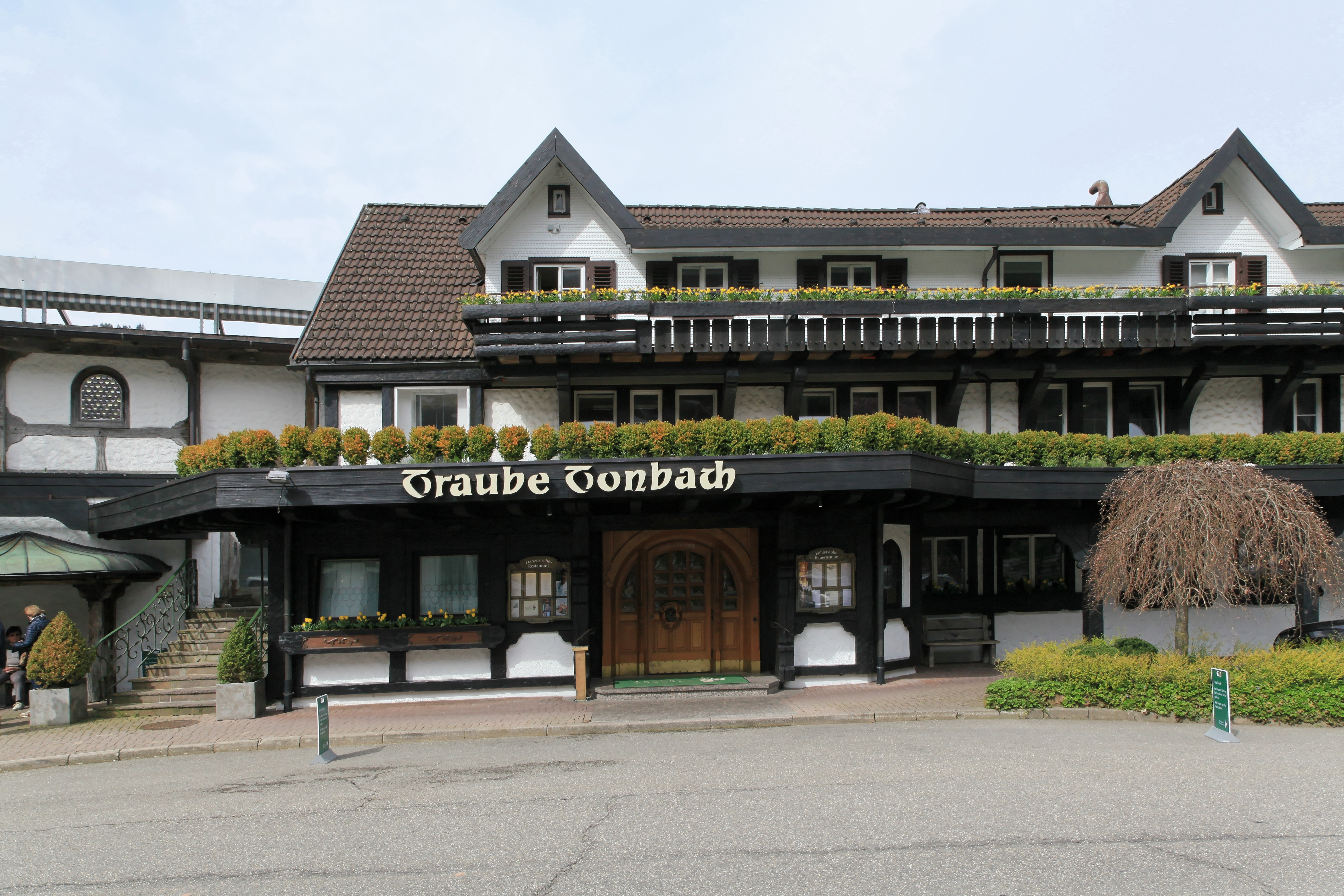 Hotel Traube Tonbach, Tonbachstraße 237 in Tonbach, Baiersbronn